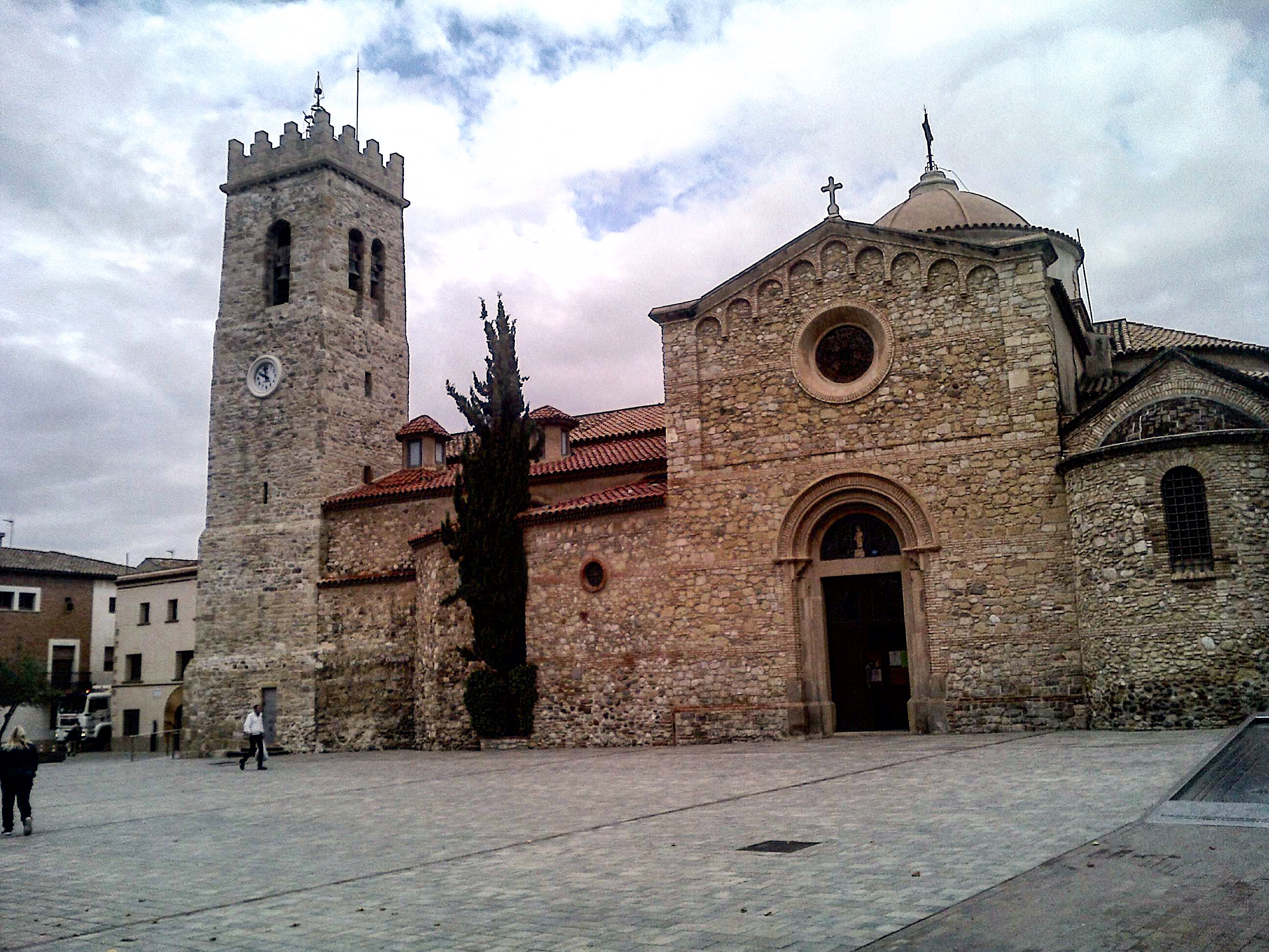 Església de Sant Pere de Rubí, any 986